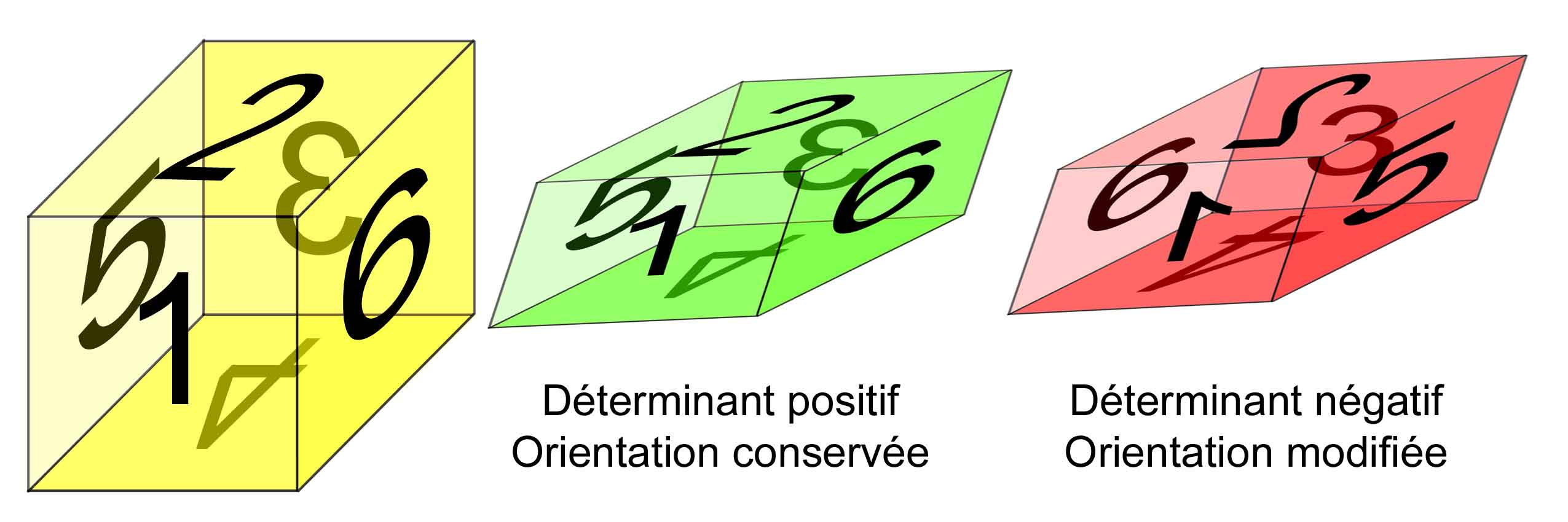 Il·lustra el canvi o conservació de la orientació en aplicar una funció depenent de si el seu determinant és negatiu o positiu